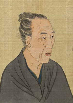 古川古松軒肖像『近世名家肖像』より